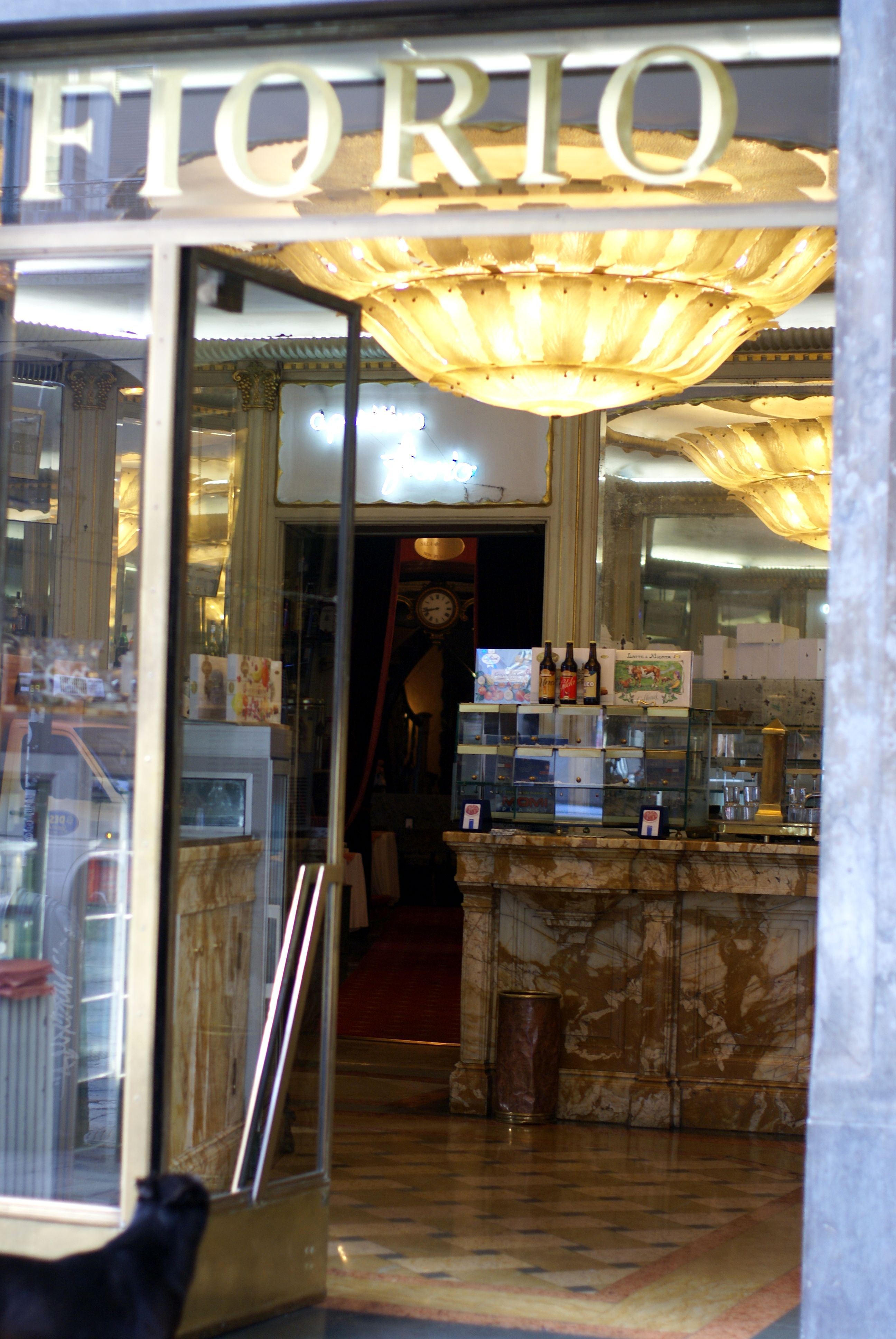 Torino, Via Po, Caffè Fiorio